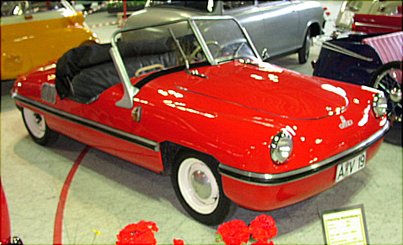 Victoria Spatz